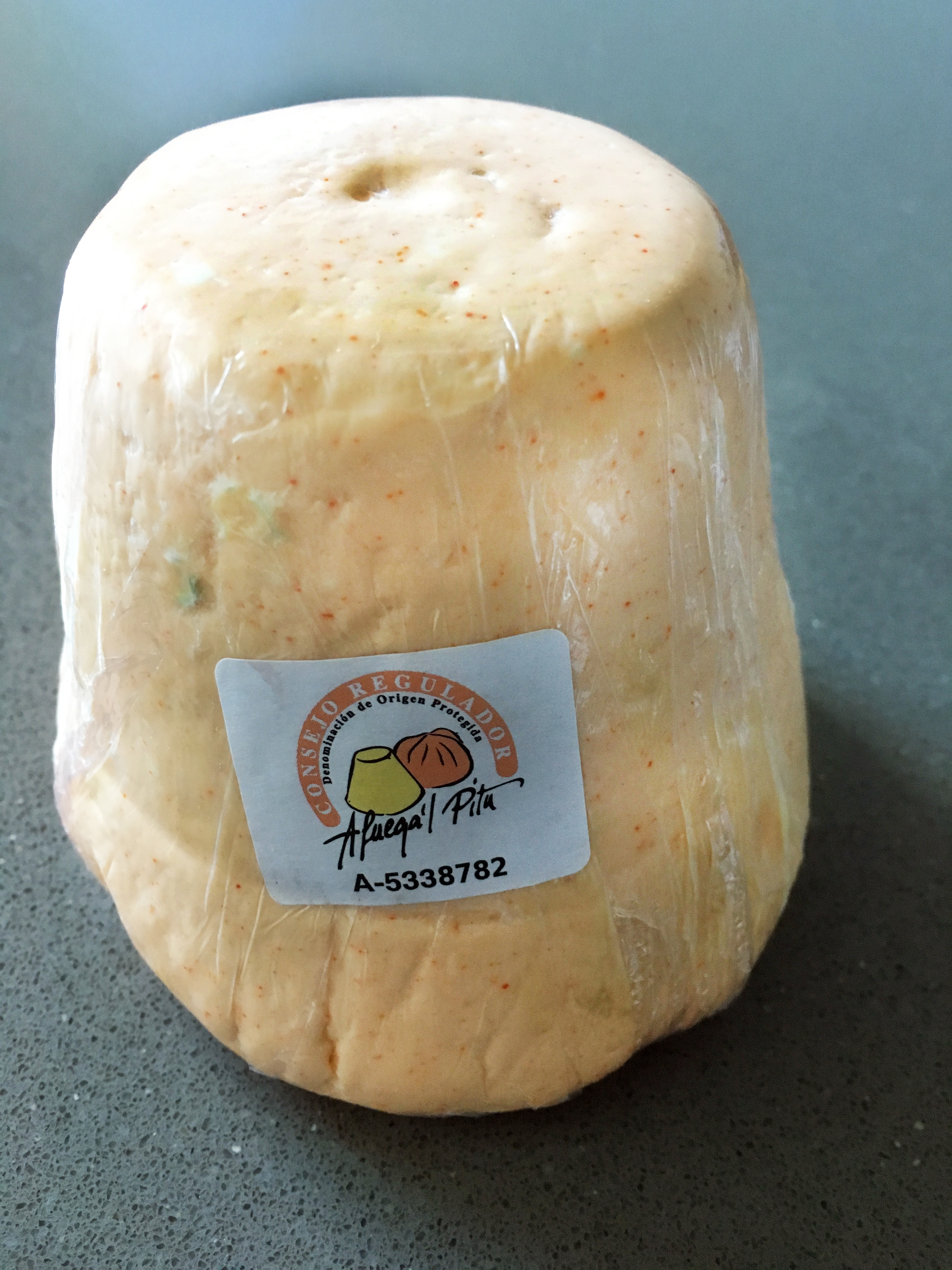 Queso afuega el pitu